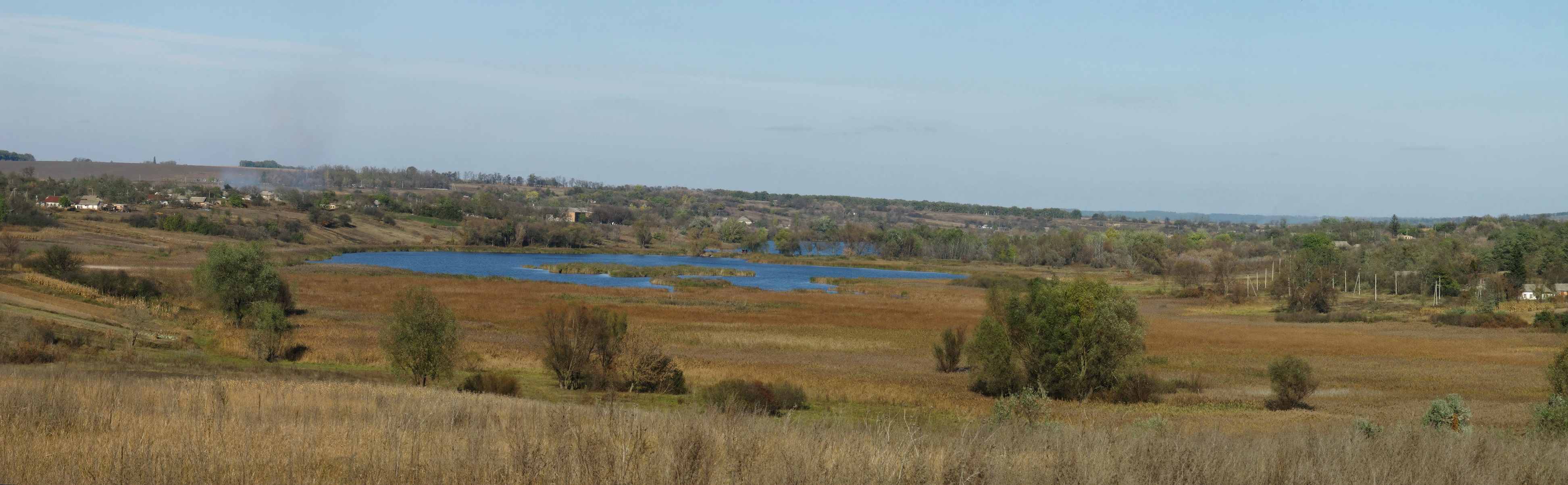 «Розумівська балка», Олександрівський р-н, с. Бовтишка